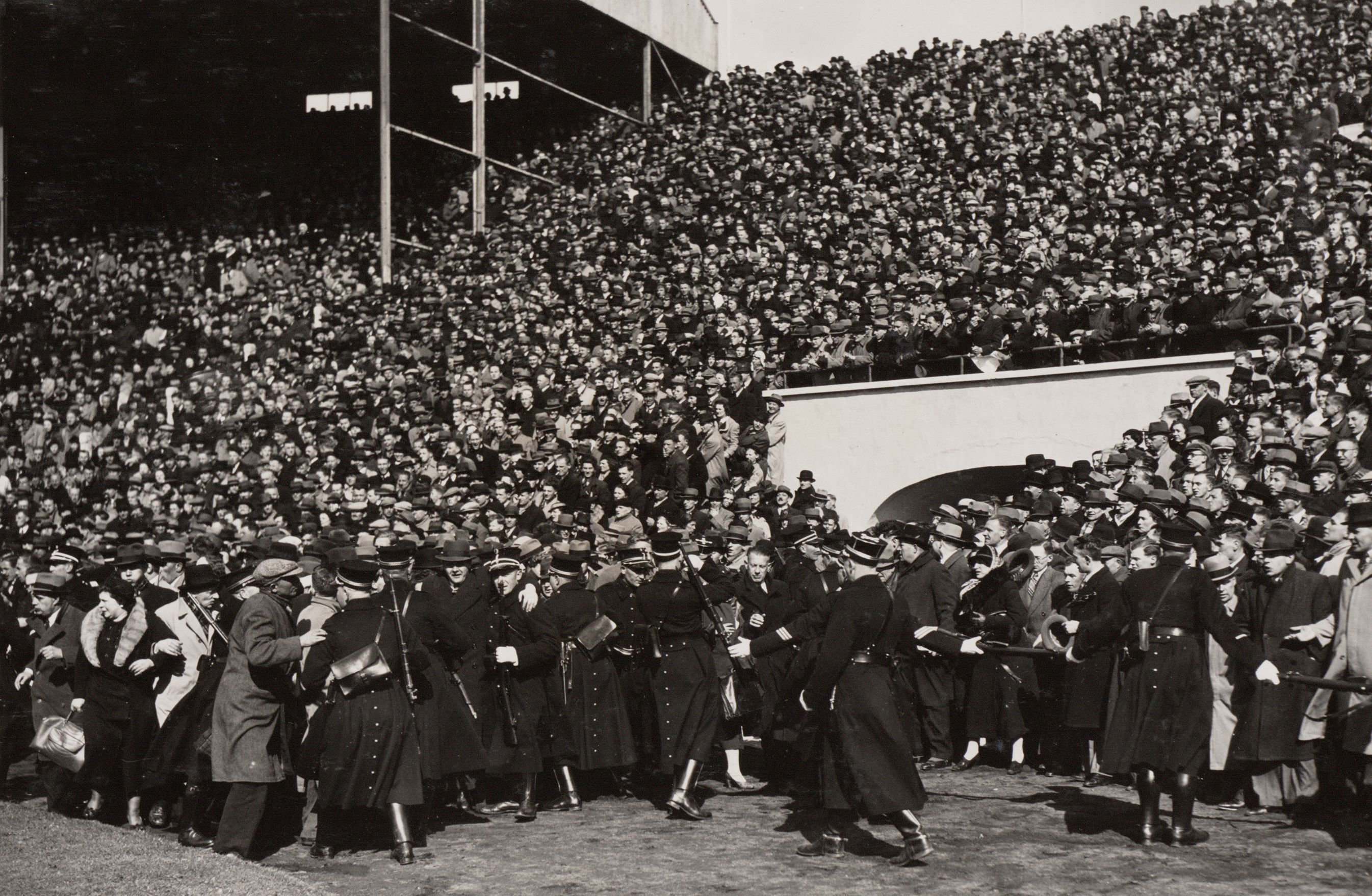 Publiek dat wegens de grote drukte op het veld dreigt terecht te komen, wordt door de politie teruggedrongen. België - Nederland (1-1), gespeeld op 3 april 1938 in het stadion van Antwerp FC (De Bosuil) te Antwerpen.